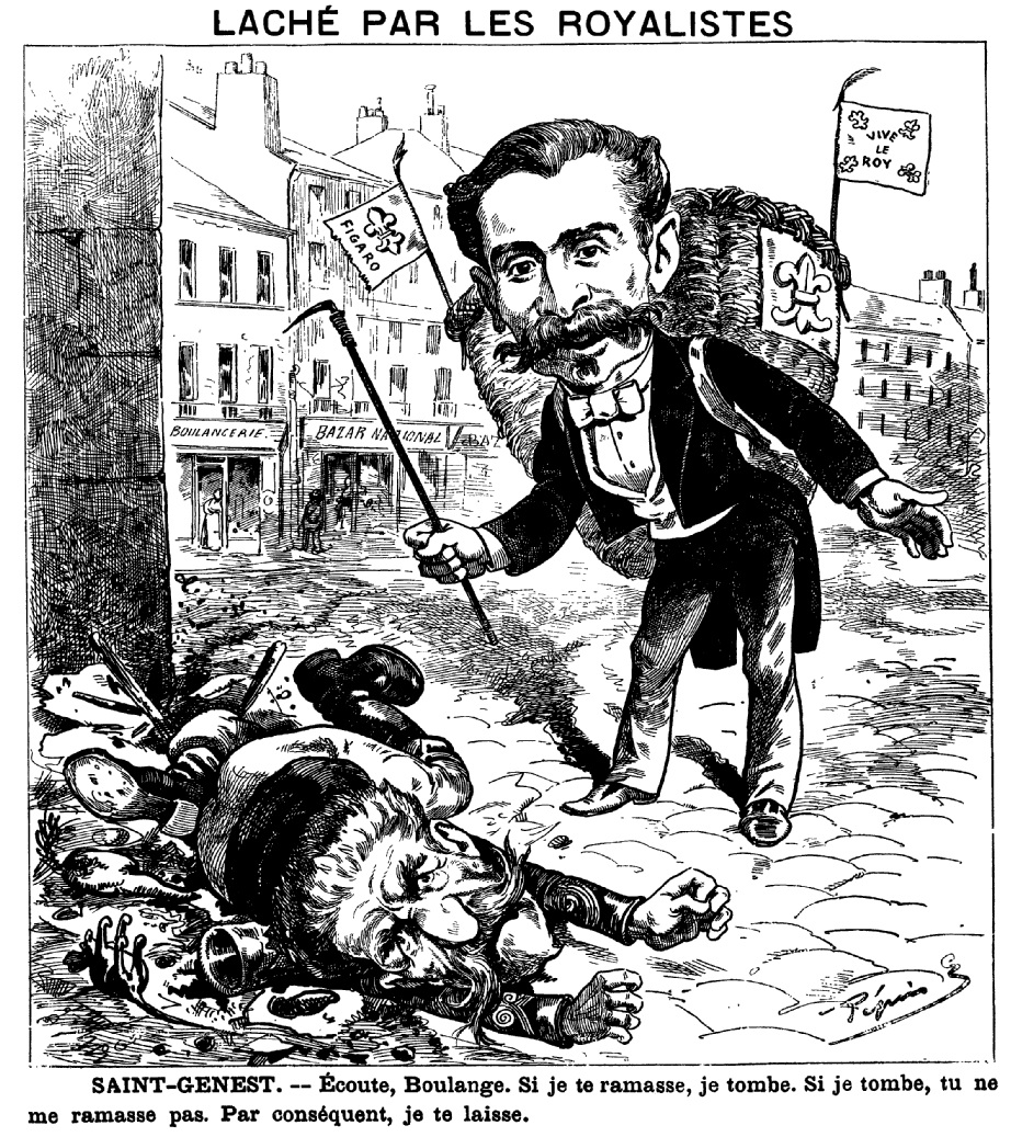 "Lâché par les royalistes. Saint-Genest : Écoute, Boulange. Si je te ramasse, je tombe. Si je tombe, tu ne me ramasses pas. Par conséquent, je te laisse."